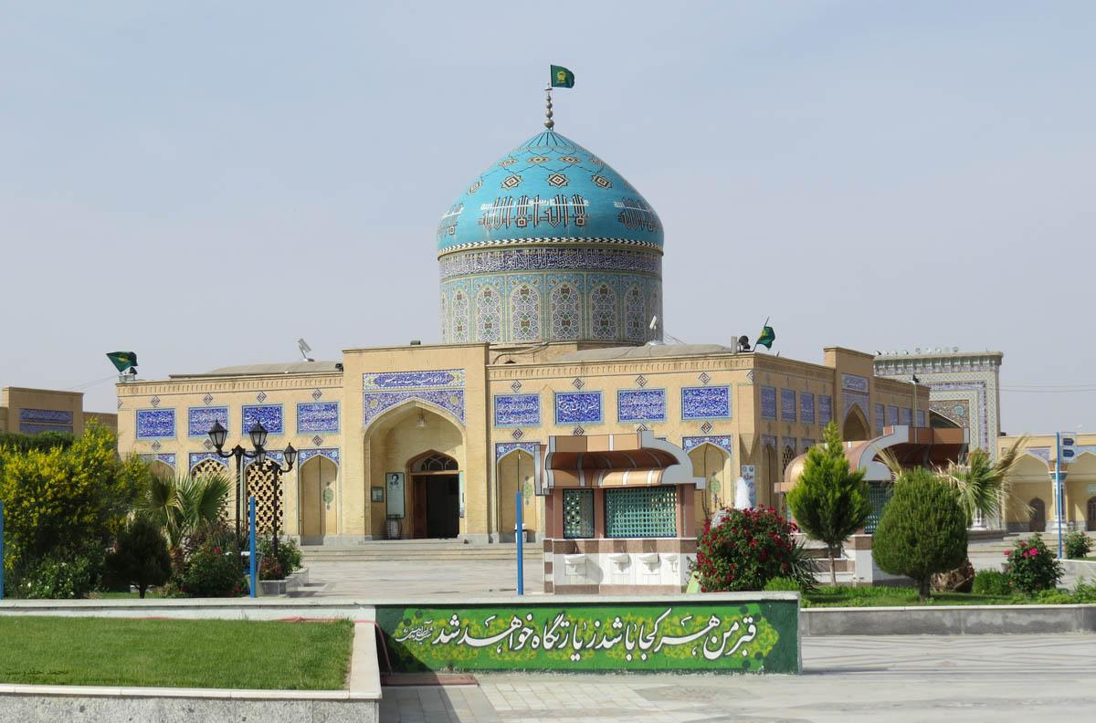 آرامگاه شهید مدرس کاشمر